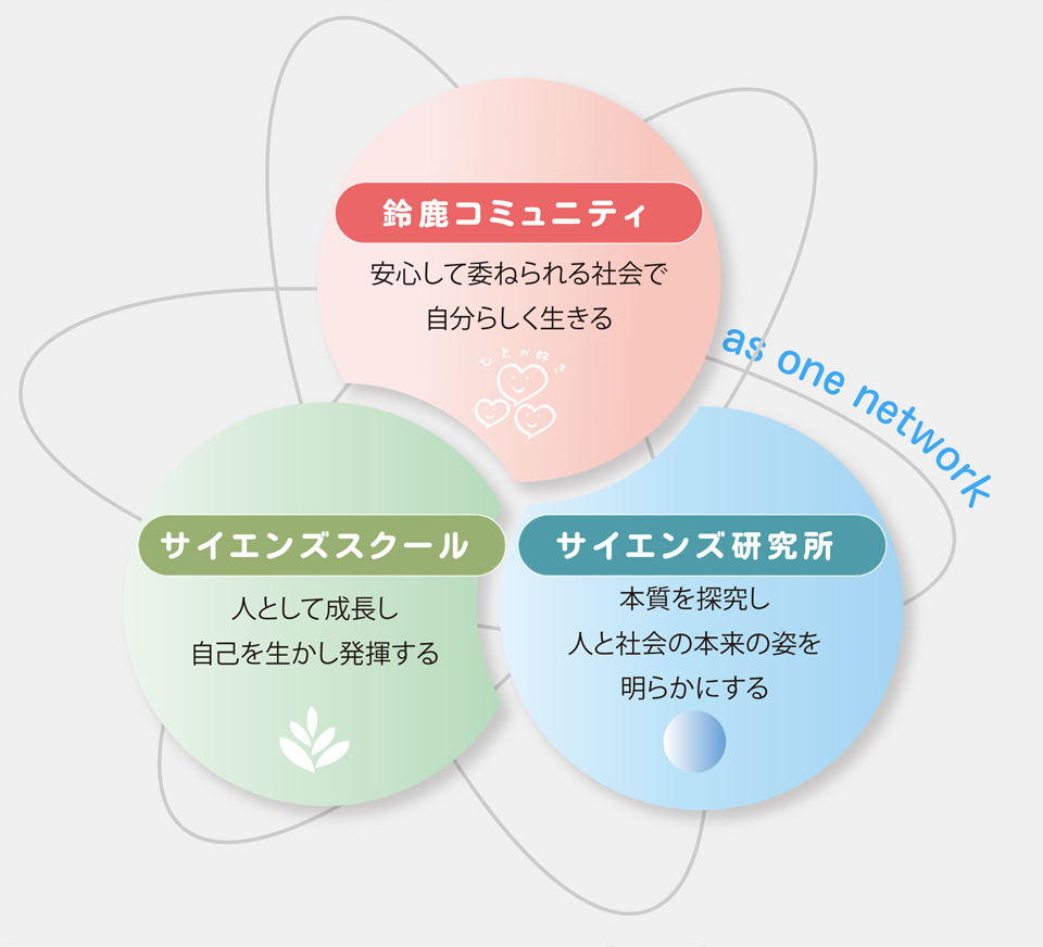 アズワンコミュニティを支える社会システムです。 サイエンズ研究所とサイエンズスクールという基盤があることによって、アズワンネットワーク鈴鹿コミュニティでは、どんな活動も苦労や努力して運営することよりも、みなの知恵を駆使して見直し考え直すことを優先し、起業したり白紙に戻したり、楽しく面白く活動することが出来るようになっています。